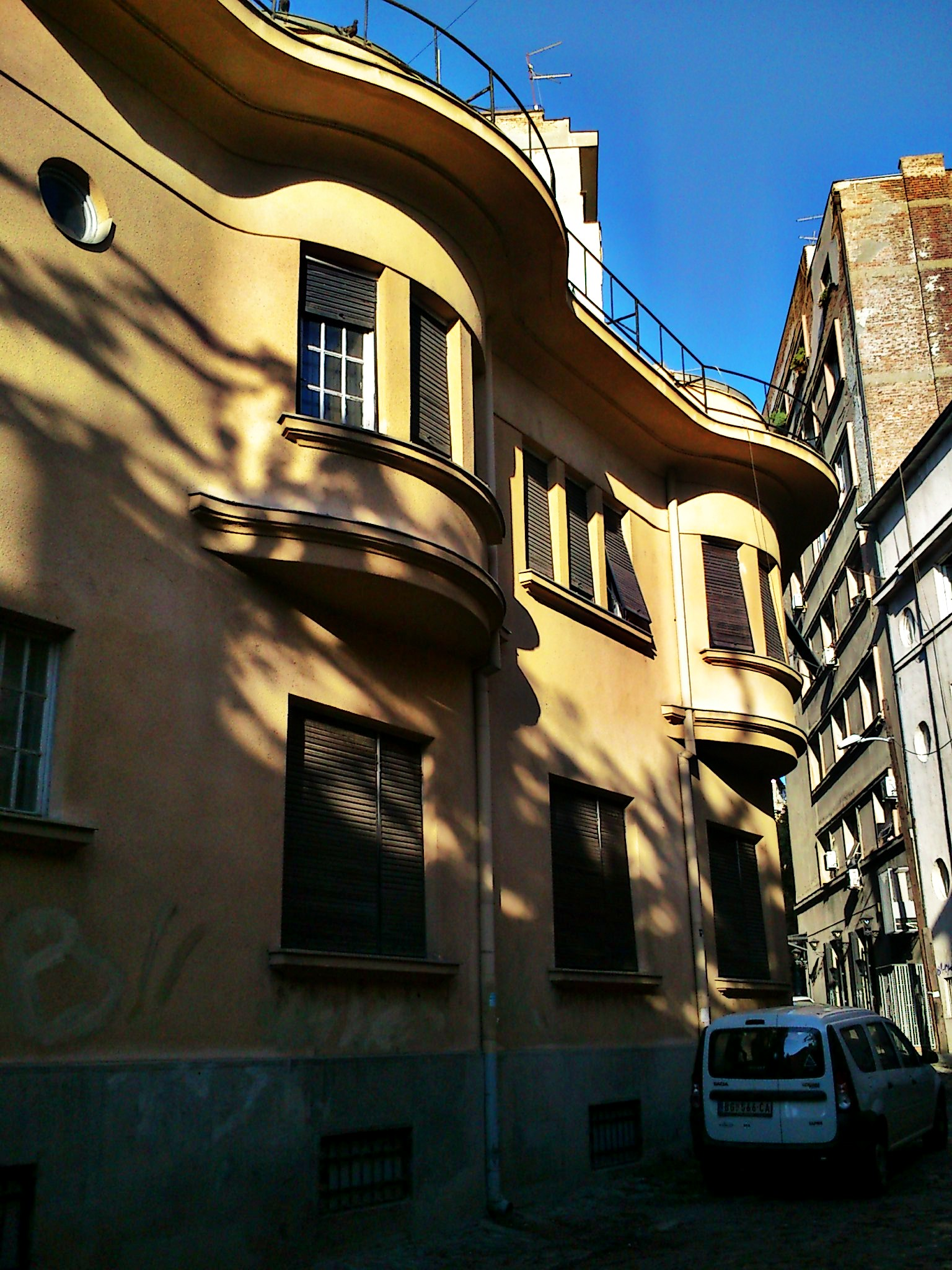 Кућа Бранислава Којића